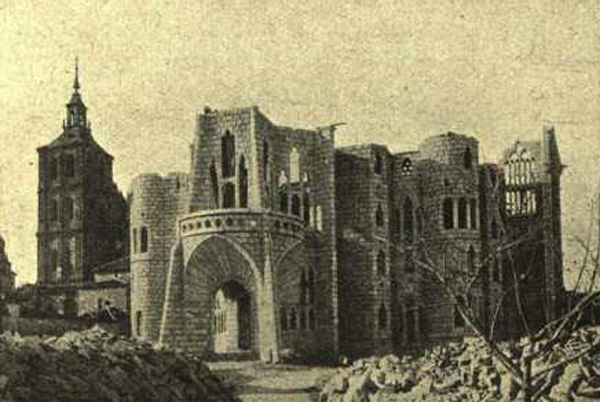 El Palacio Episcopal de Astorga en obras.